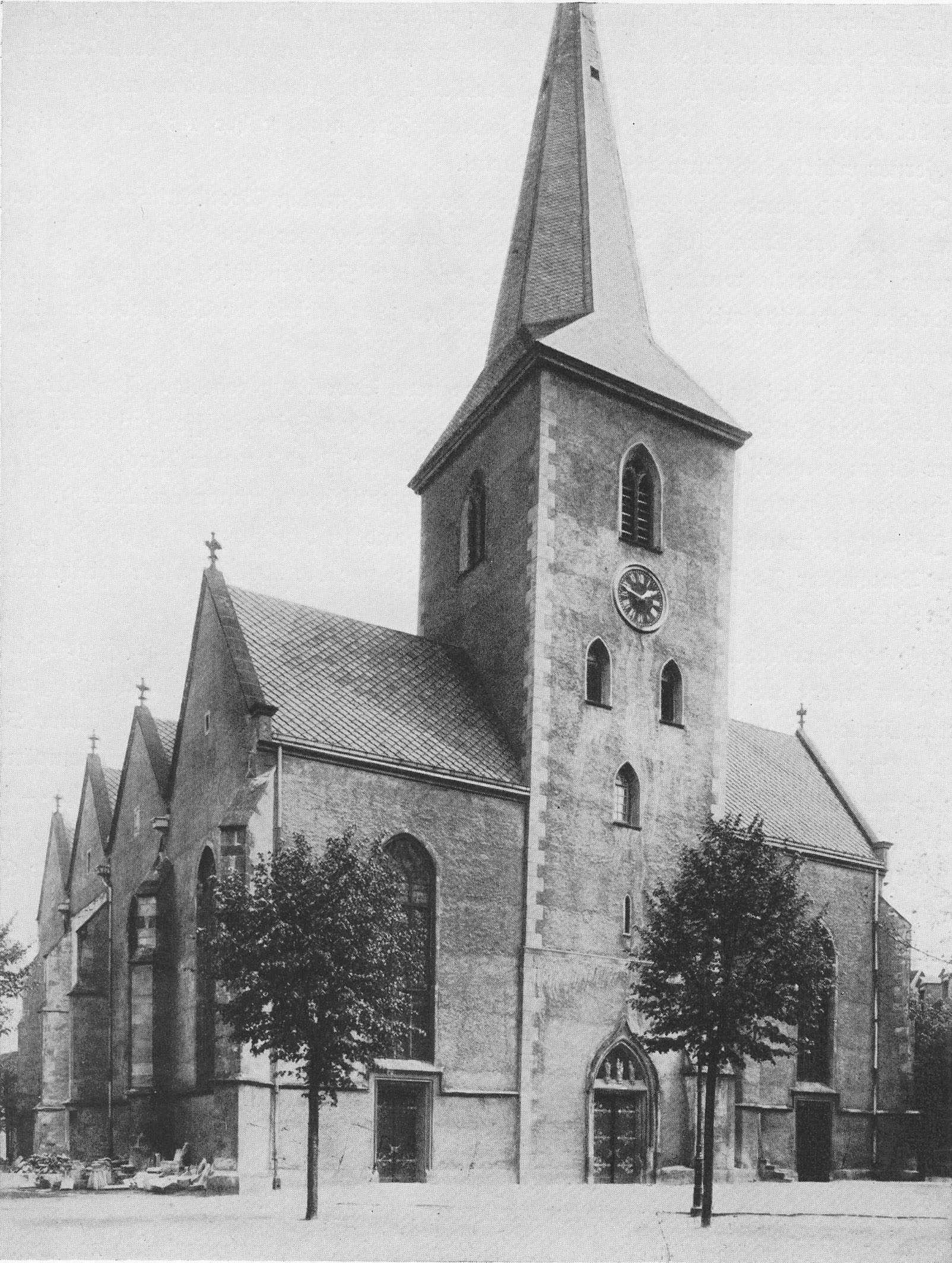 St. Laurentius in Warendorf bevor die Kirche ein neues Portal mit einem neuen Turm bekam